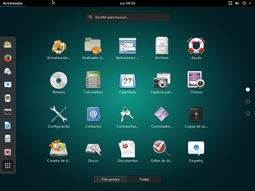 Captura de pantalla Gnome Ubuntu 16.04